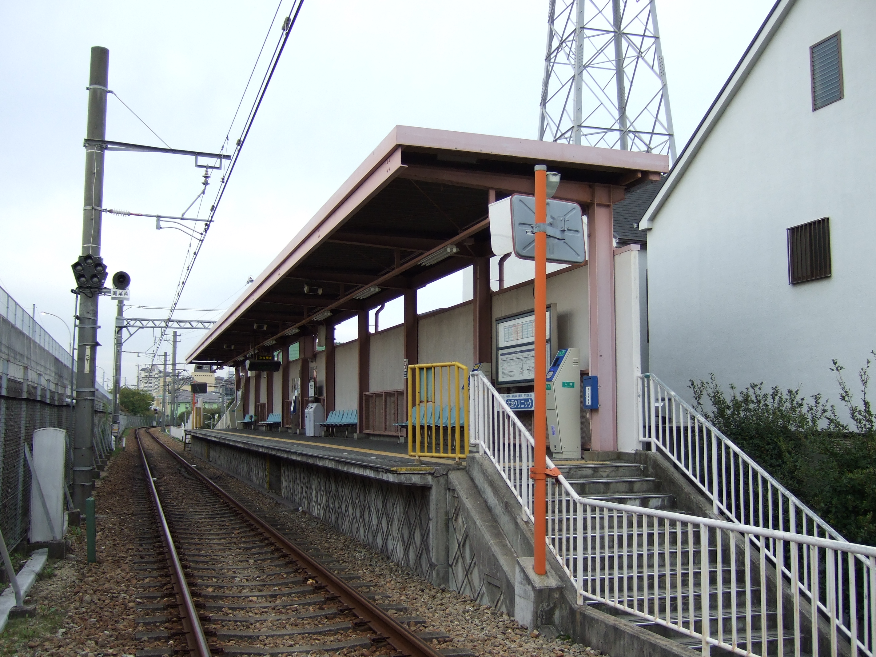 洲先駅（北側踏切より）。